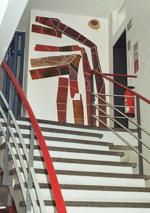 Bilck im Eingangsbereiche FA-Säckingen auf Wandkeramik Bampi-Harnest